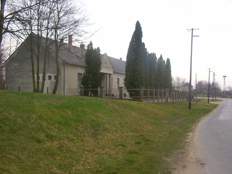 Nagydémi művelődési ház